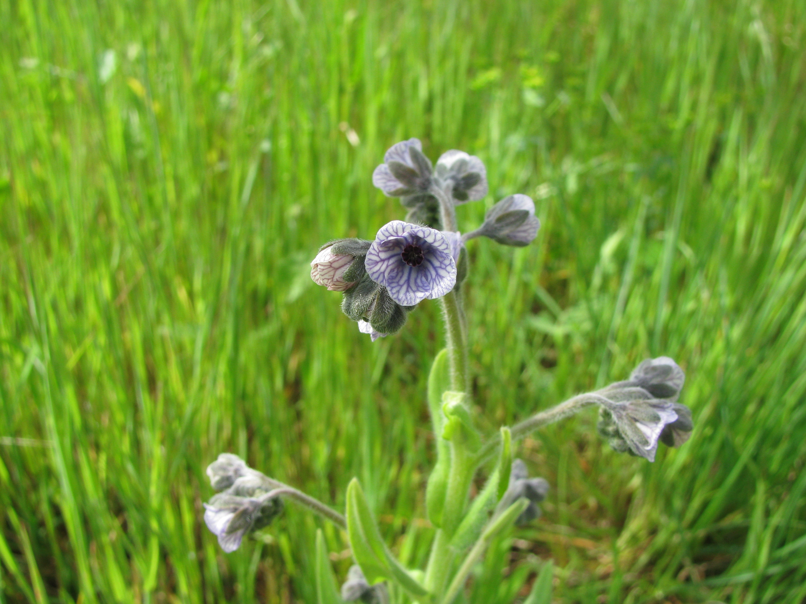 Kretische Hundszunge (Cynoglossum creticum), fotografiert von Dr. Hagen Graebner am 09.04.2009 im Naturschutzgebiet S’Albufera, Mallorca